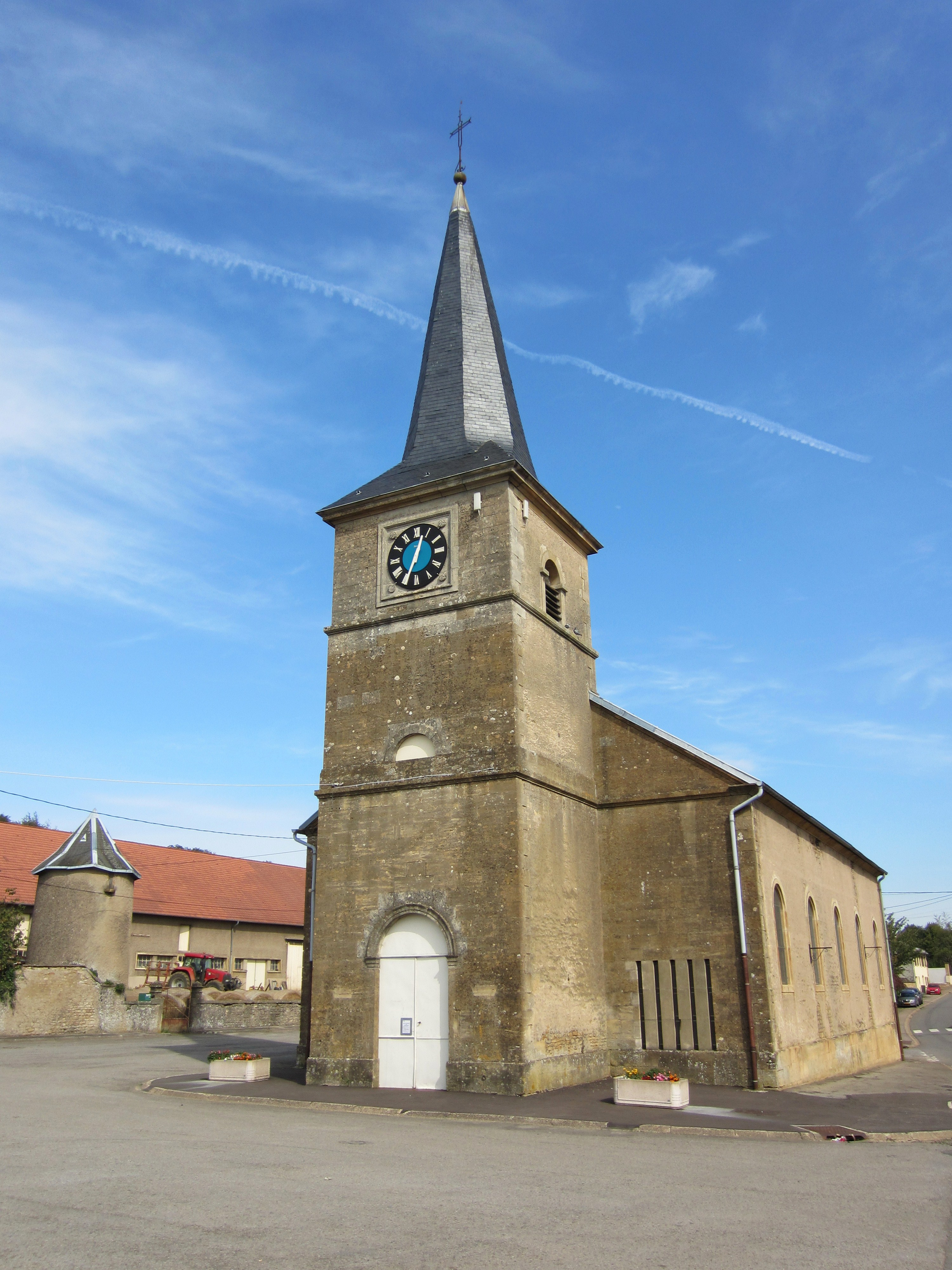 Description Église Saint Willibrord Errouville Église Saint Willibrord Errouville